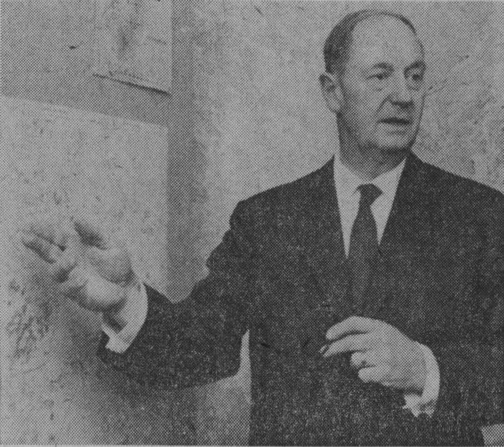 Arkitekten Folke Hjortzberg